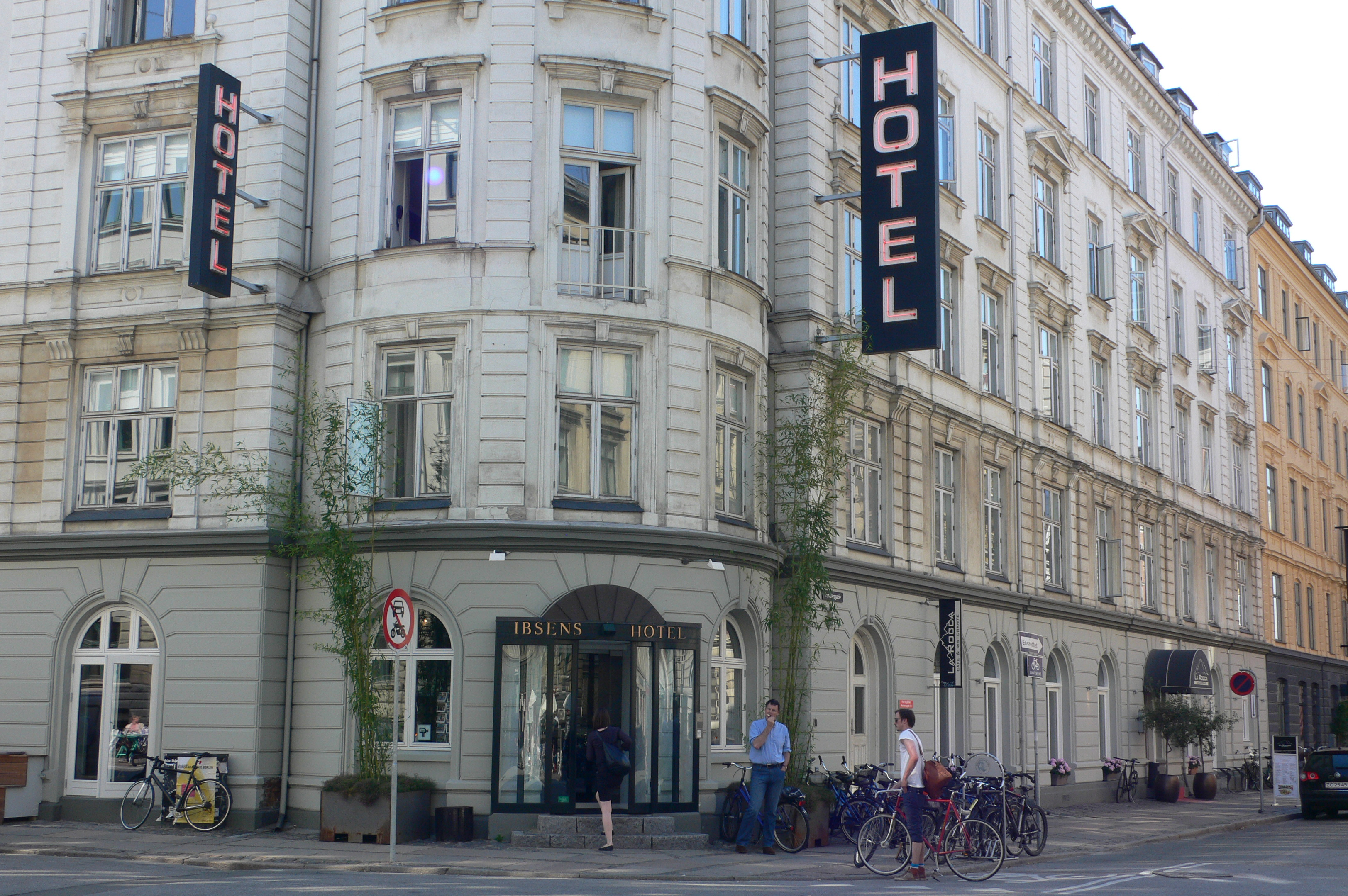 Ibsens Hotel on the corner of Nansensgade and Vendersgade in Copenhagen, Denmark